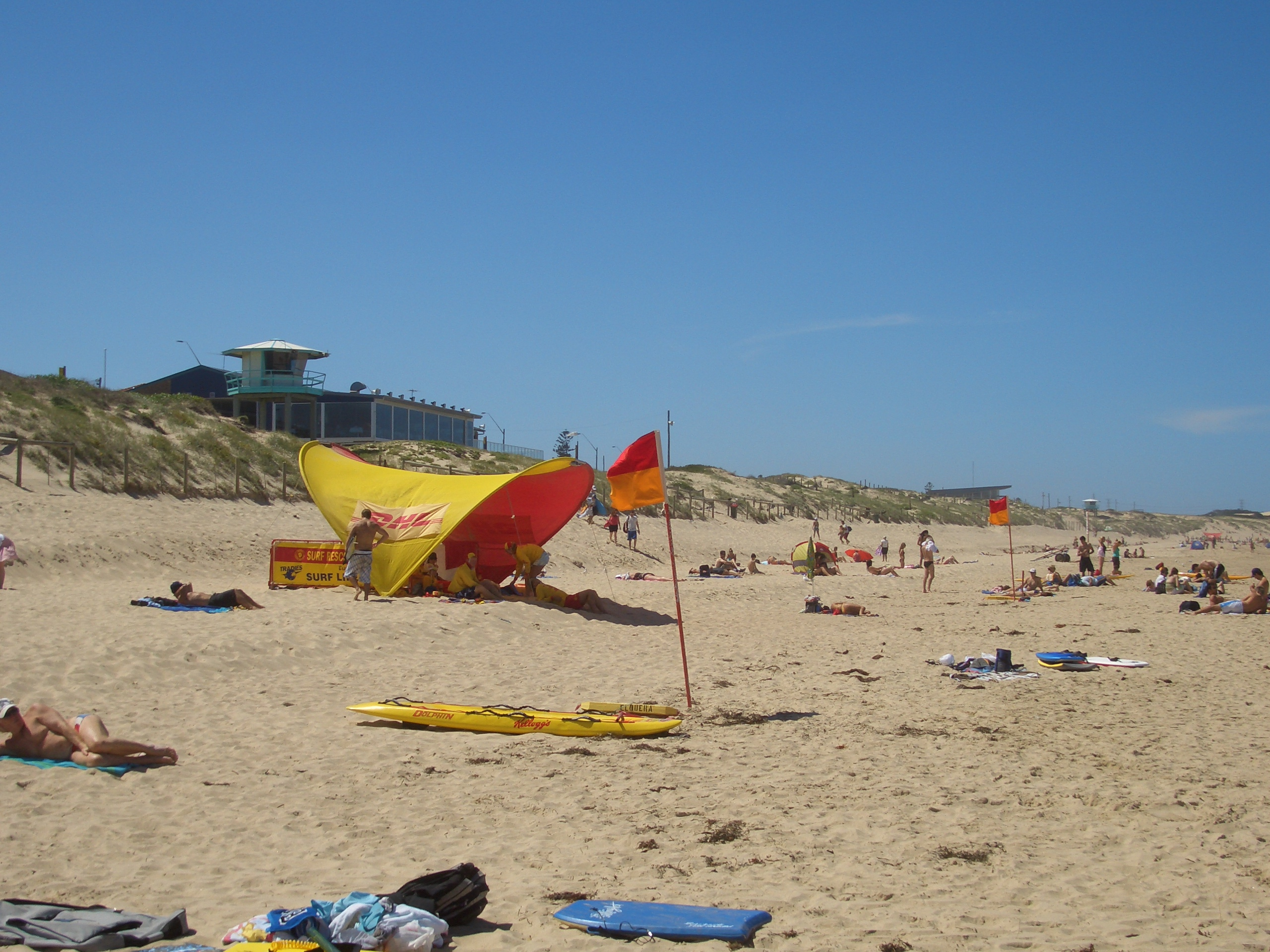 Elouera Beach